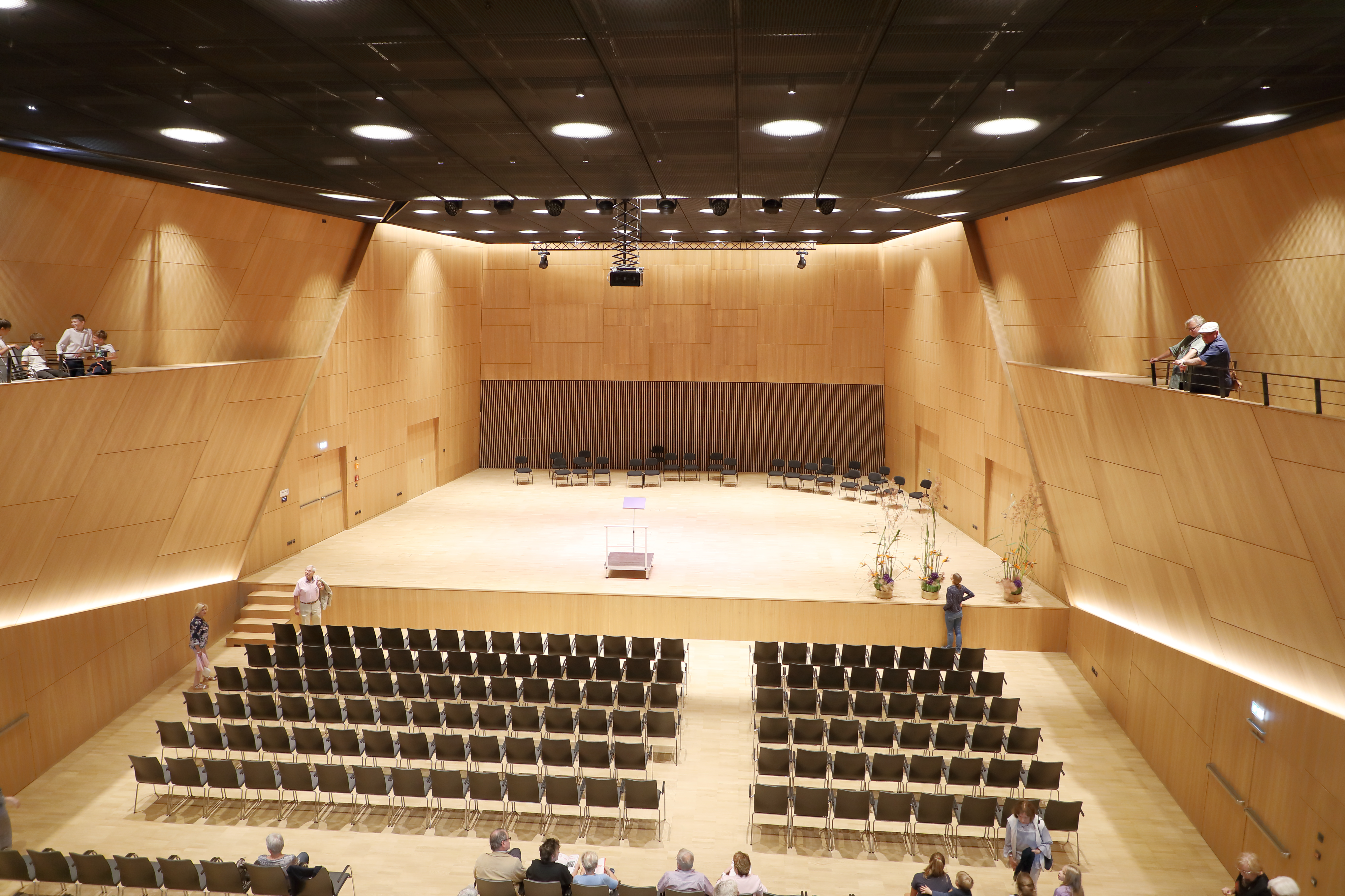 In der Tauberphilharmonie Weikersheim am Tag der Eröffnung im Juli 2019.